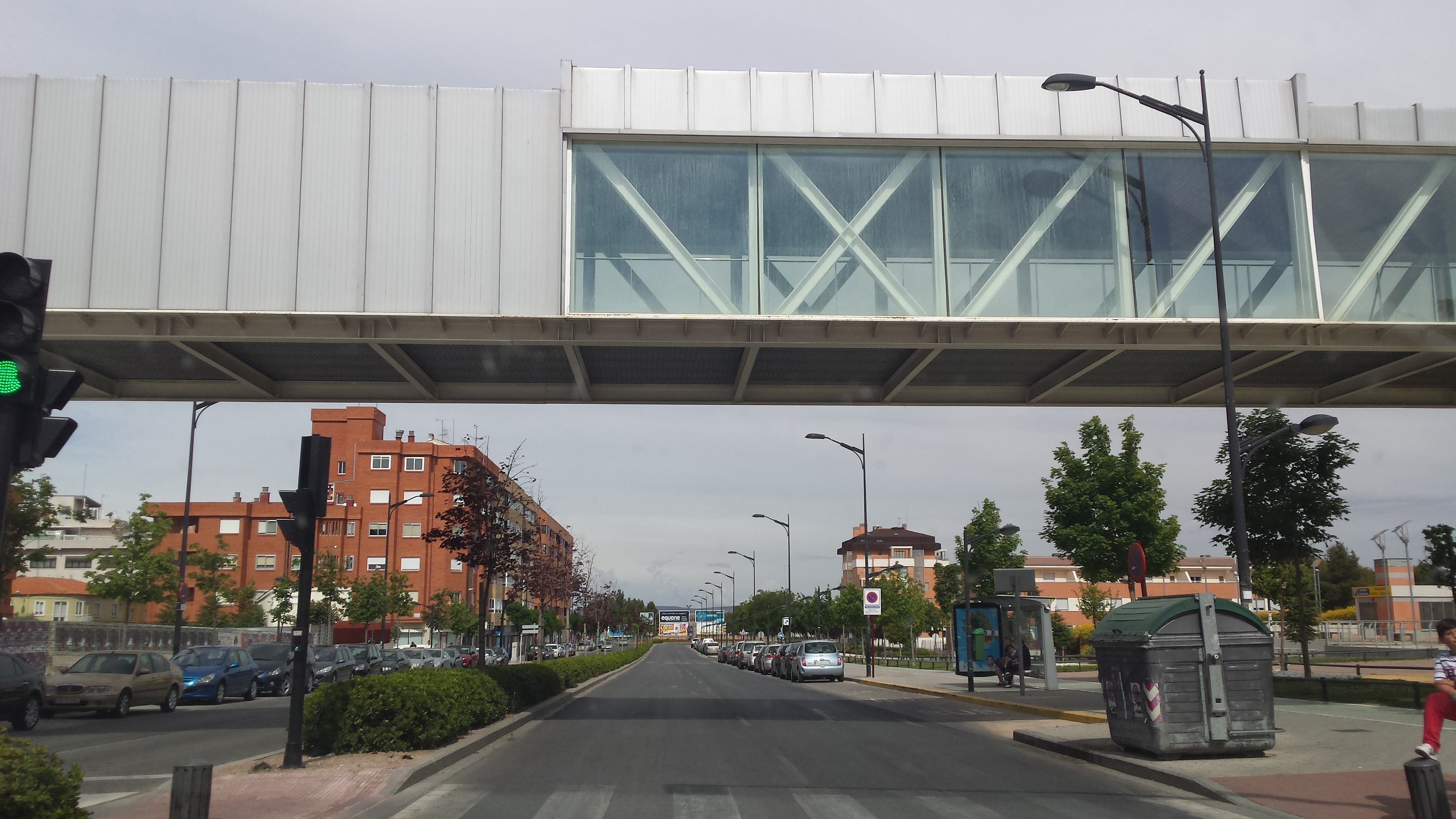 Circunvalación de Albacete. Plataforma entre el Hospital General Universitario de Albacete y la Facultad de Medicina de Albacete